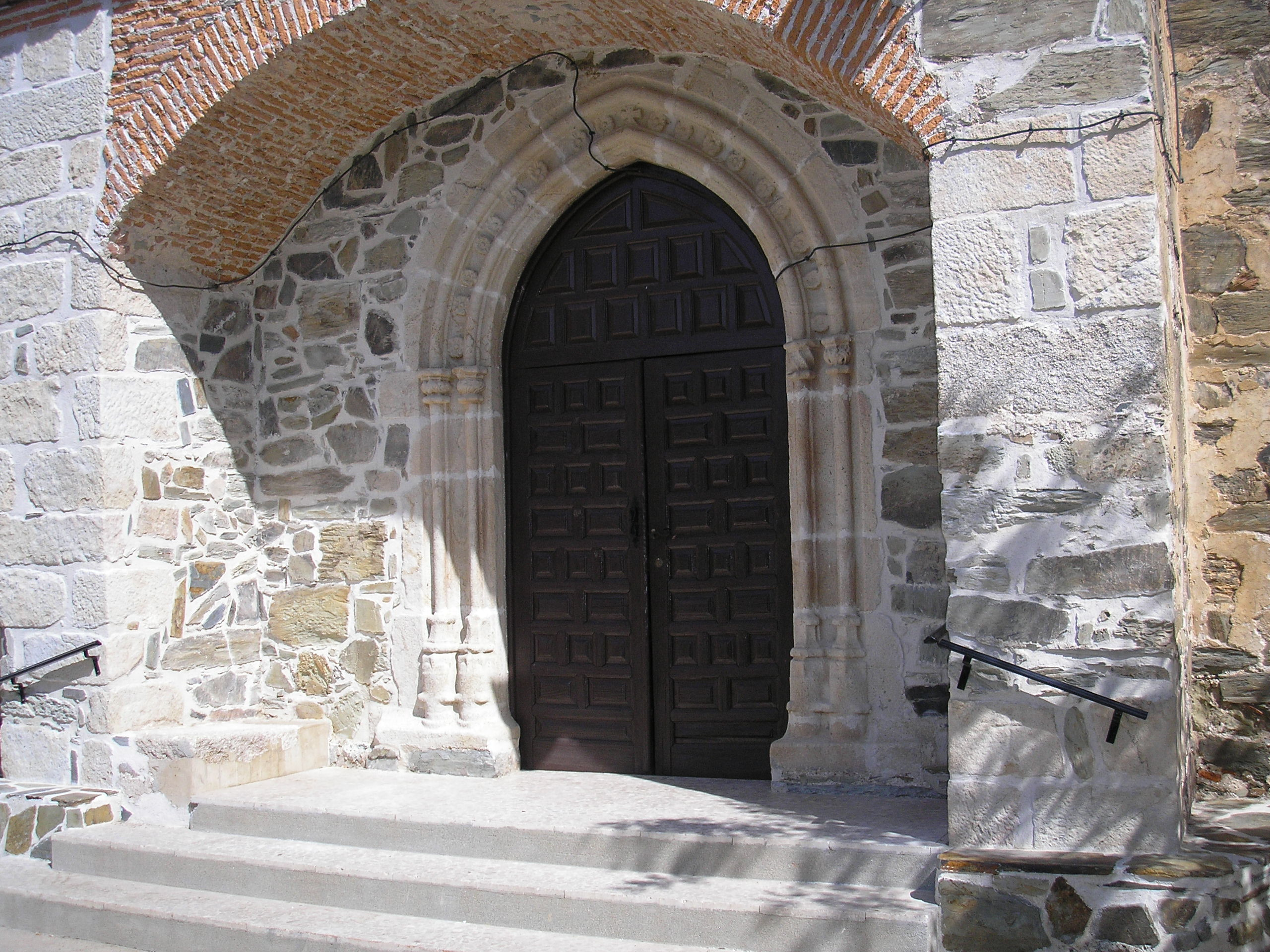 Puerta de la iglesia de Fresnedoso de Ibor, provincia de Cáceres, España.